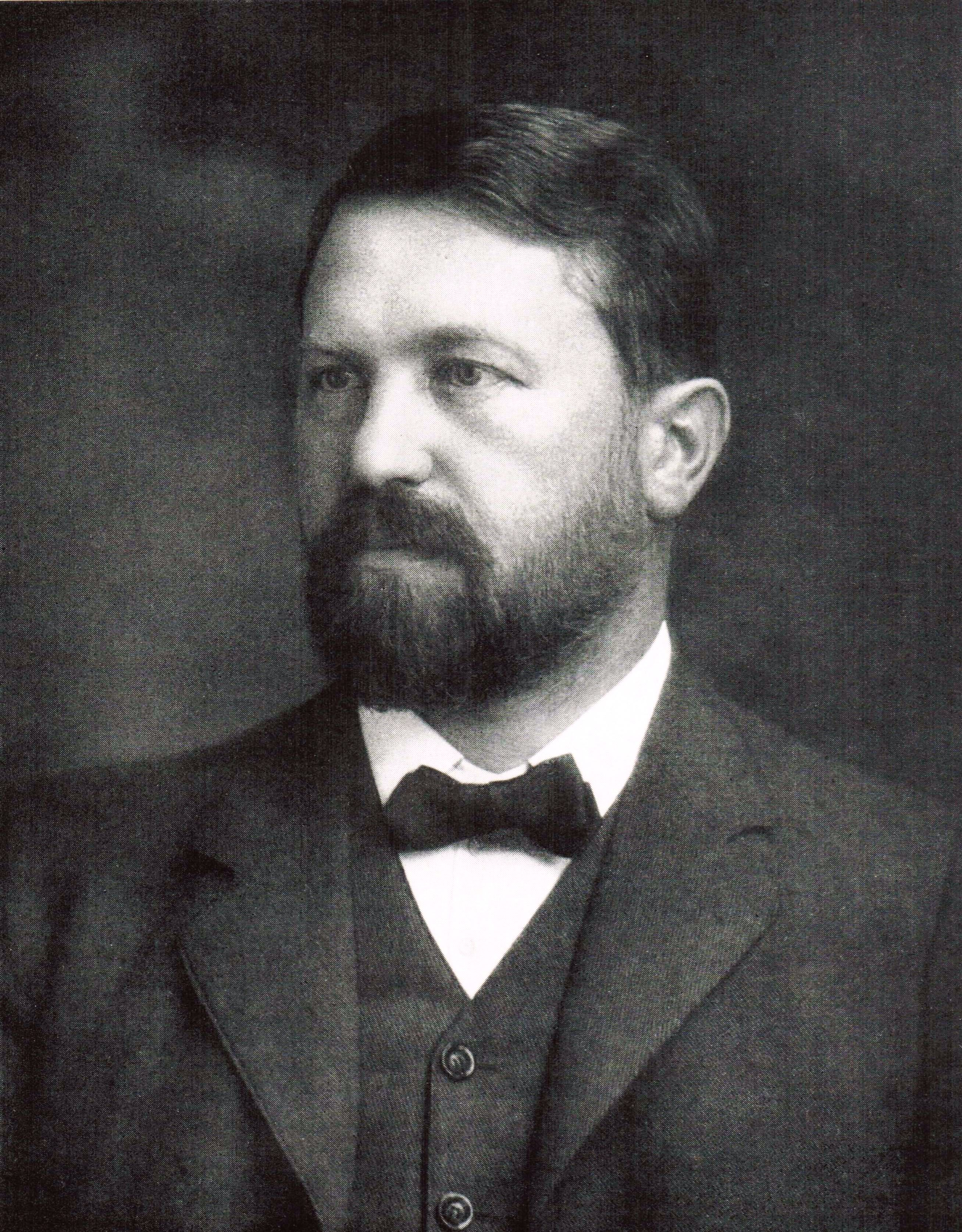 Portrait de Theodor Boveri en 1908